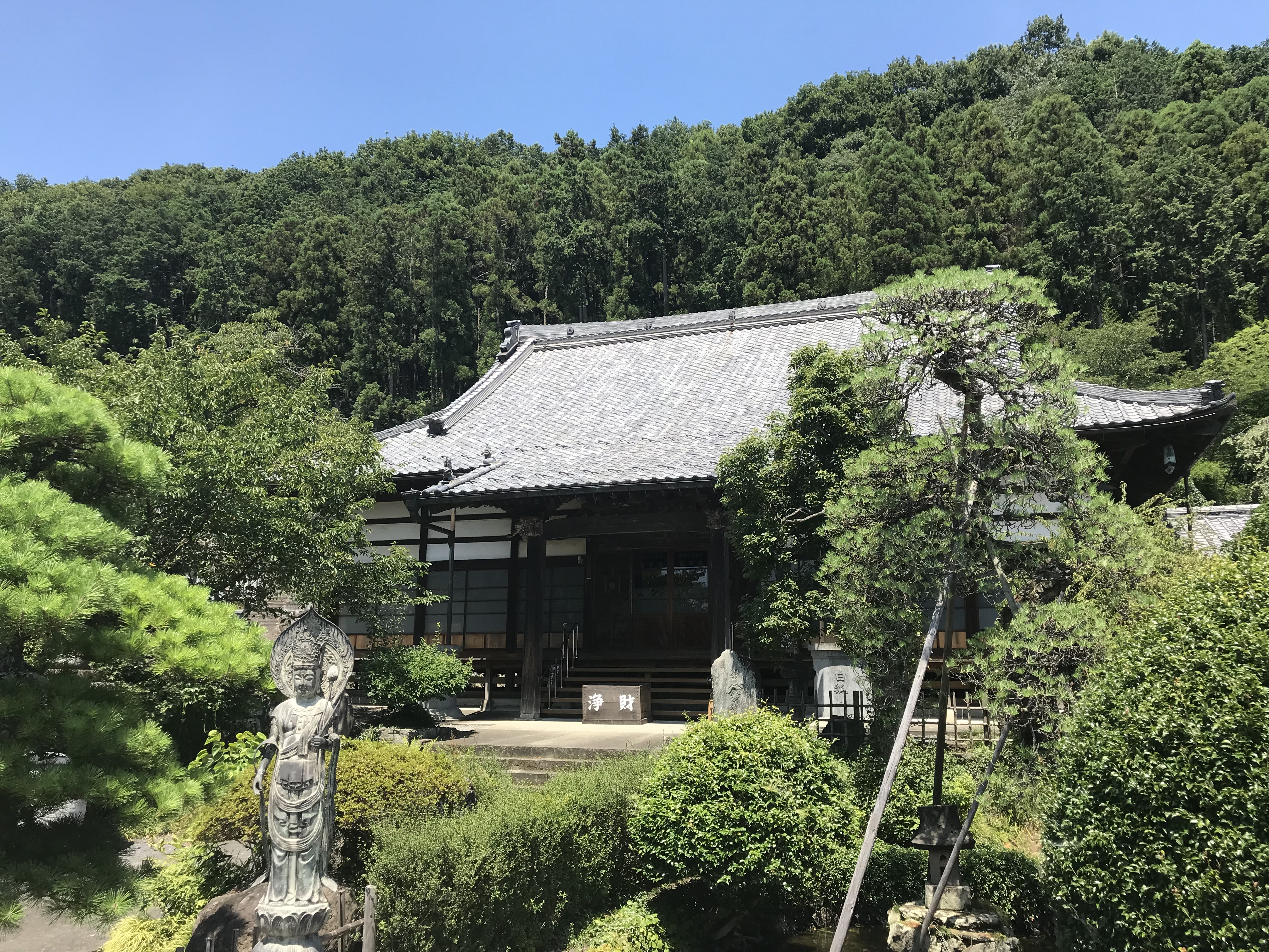 埼玉県大里郡寄居町の寺院